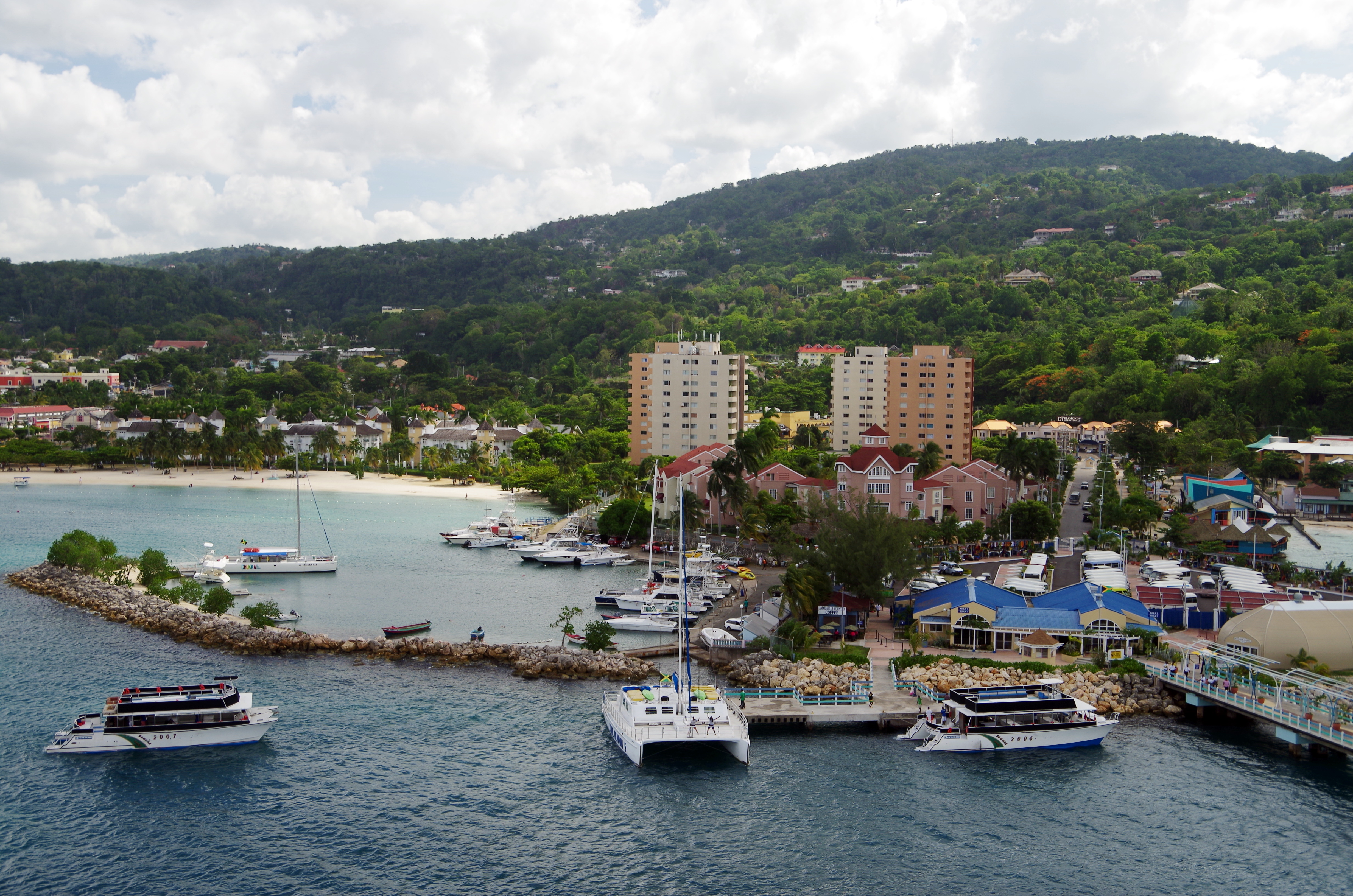 Blick zum Hafen